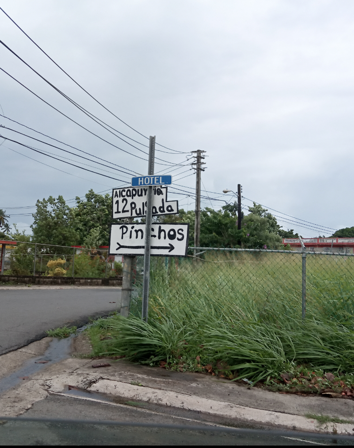 Se venden pinchos en Parcelas Fortuna en Barrio Mameyes I en Luquillo, Puerto Rico